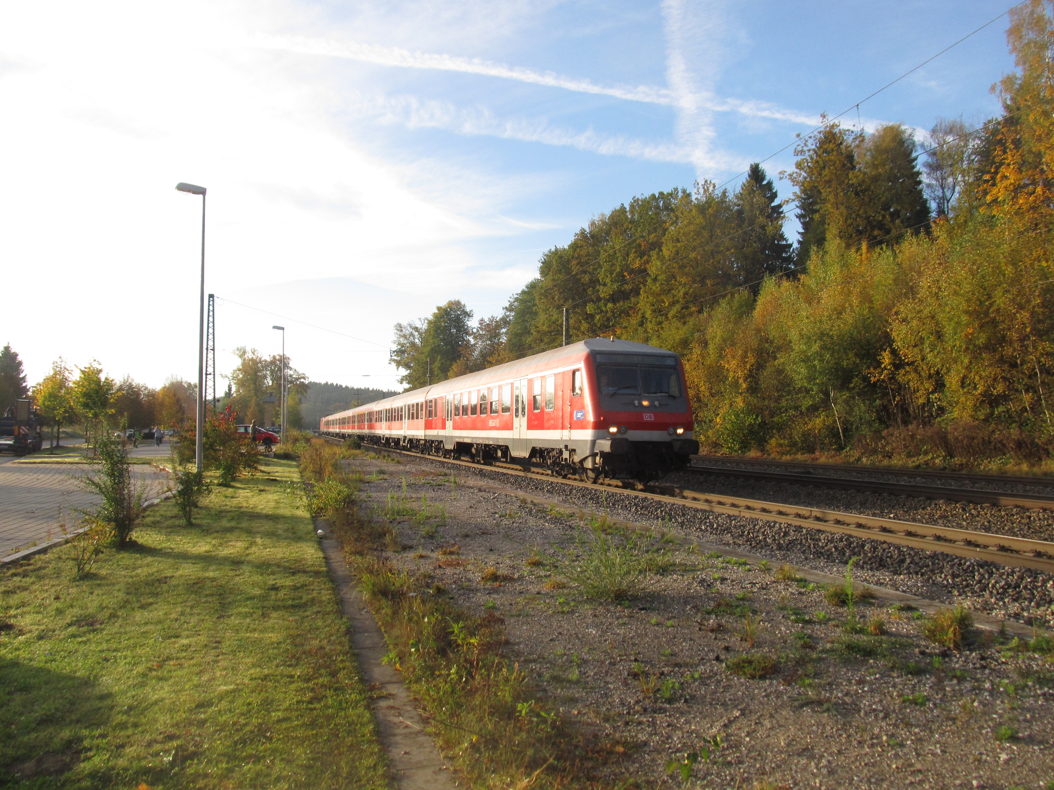 RE bei Aßling (Oberbay)